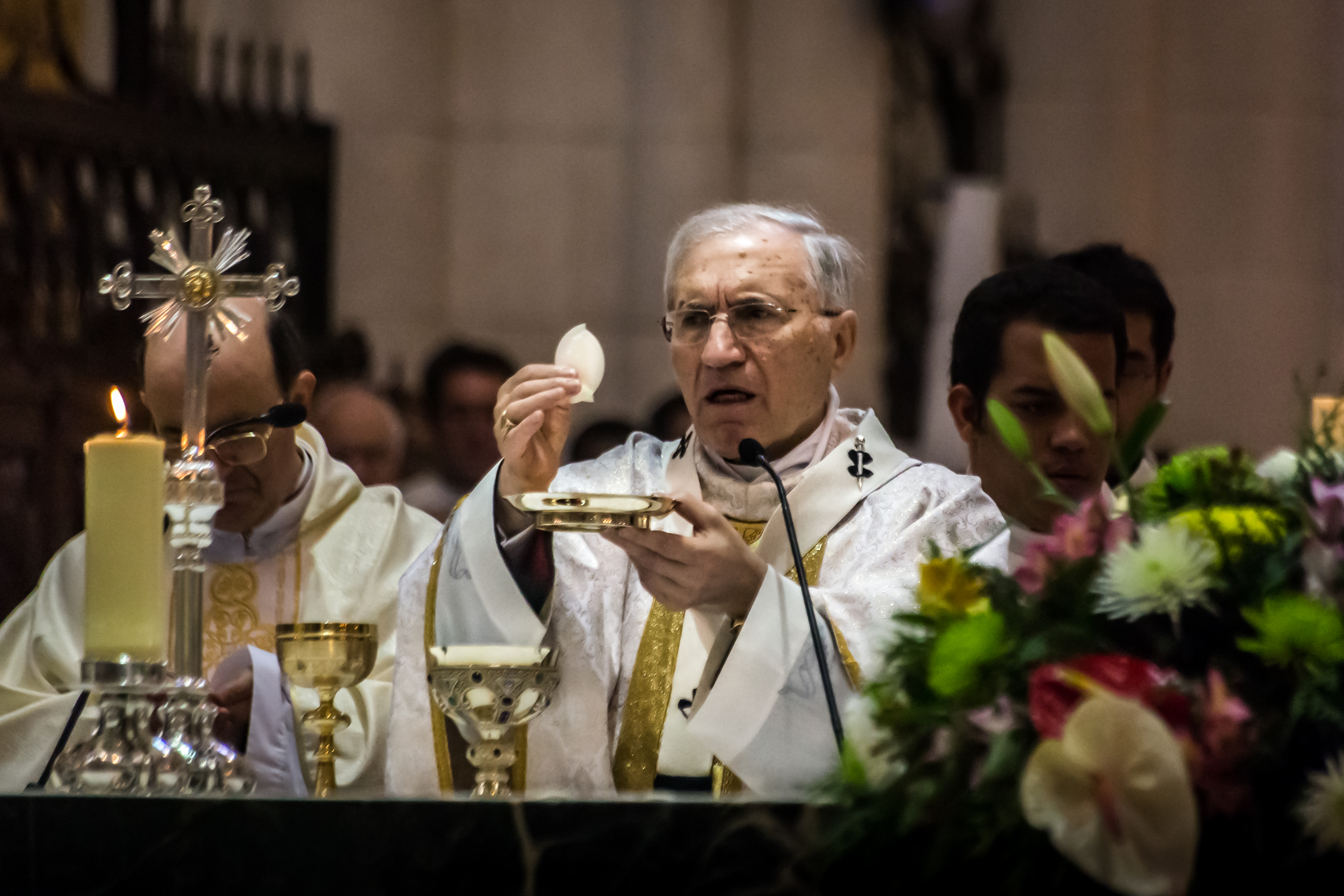 Cardenal Rouco Varela oficiando la misa de la Jornada de la Vida Consagrada. Catedral de la Almudena, Madrid.